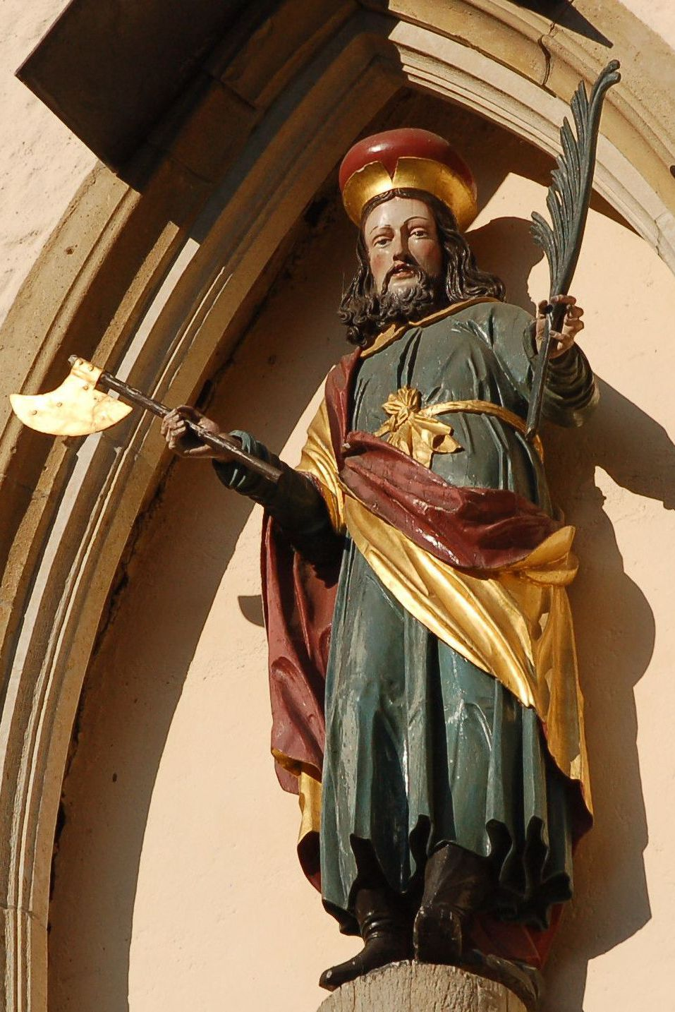 Statue von Trudpert am Chor der ehem. Klosterkirche St. Trudpert in Münstertal (Schwarzwald)